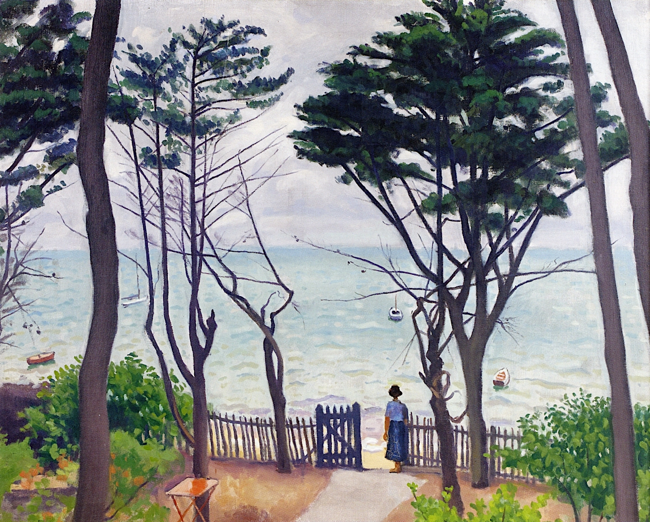 Le jardin au Pilat